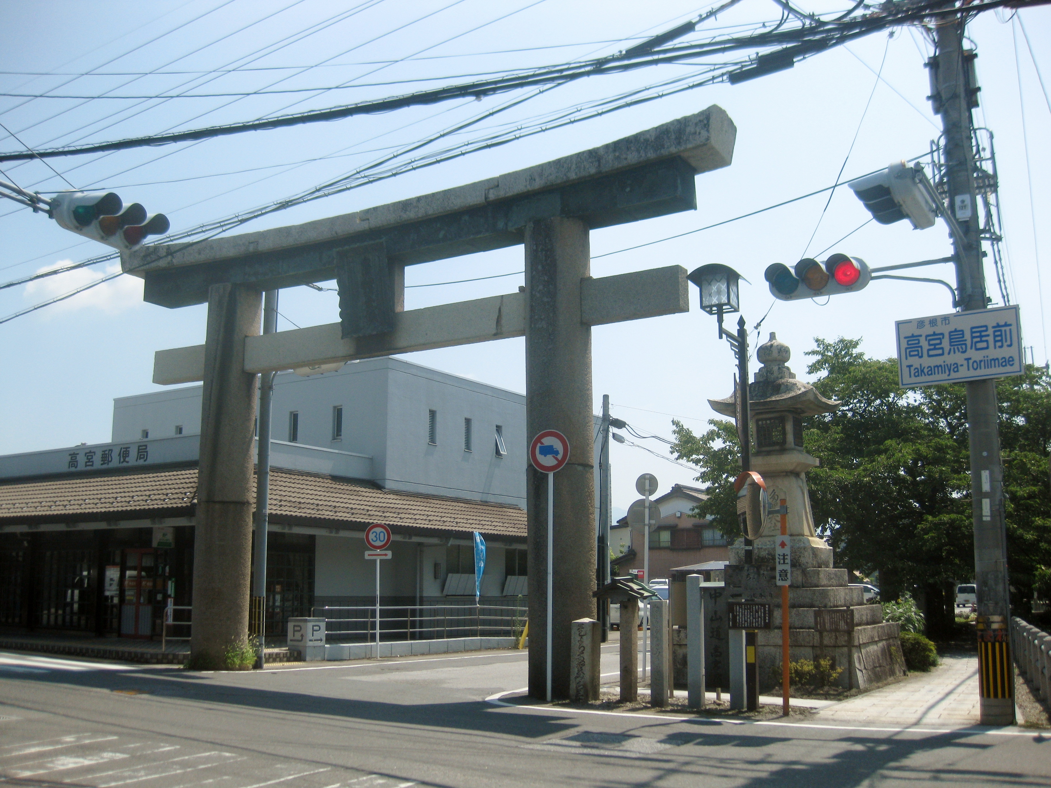 滋賀県彦根市高宮町の高宮鳥居。正面より。